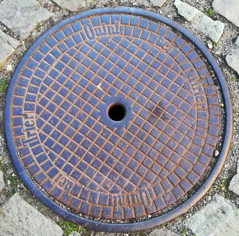 Schachtabdeckung aus Quinter Gusseisen in Trier